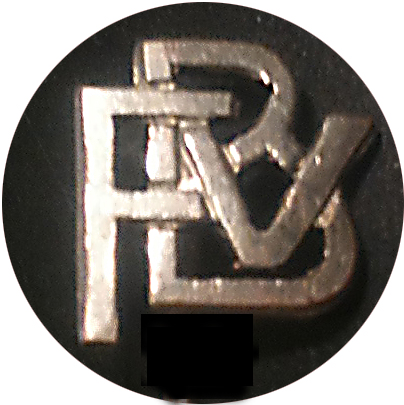 Anstecknadel des Bonner Fußball Vereins aus den 1950er Jahren